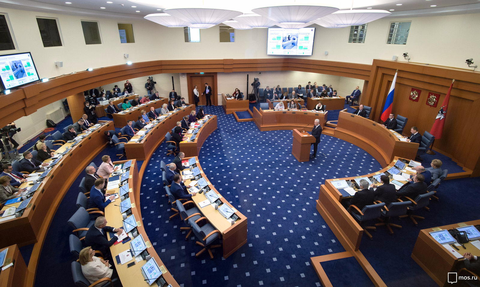 Отчёт Сергея Собянина в Московской городской Думе (октябрь 2016)